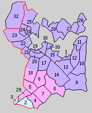 石川県鹿島郡の町村制施行時の町村。